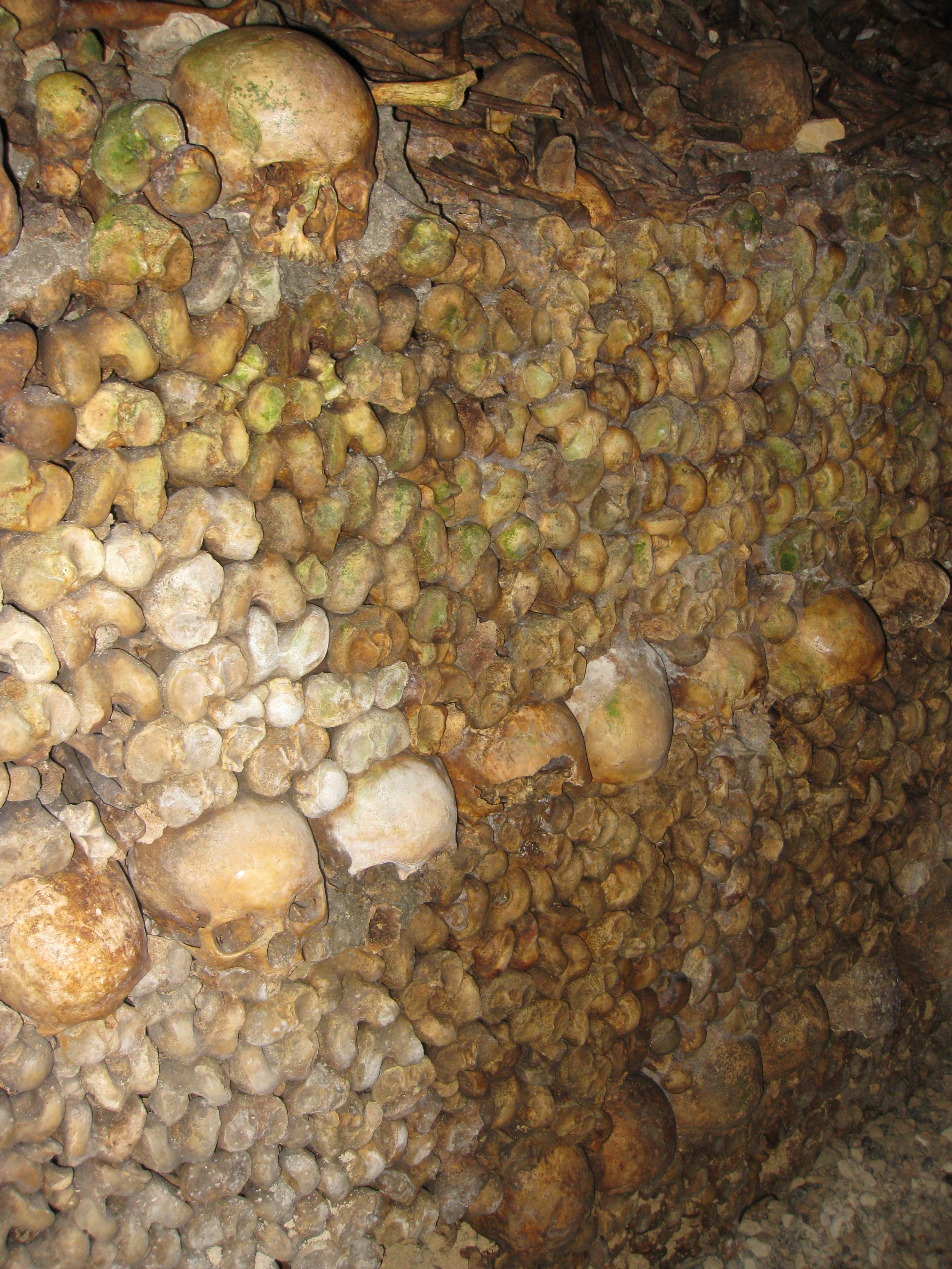 Catecombes de Paris הקטקומבות של פריז